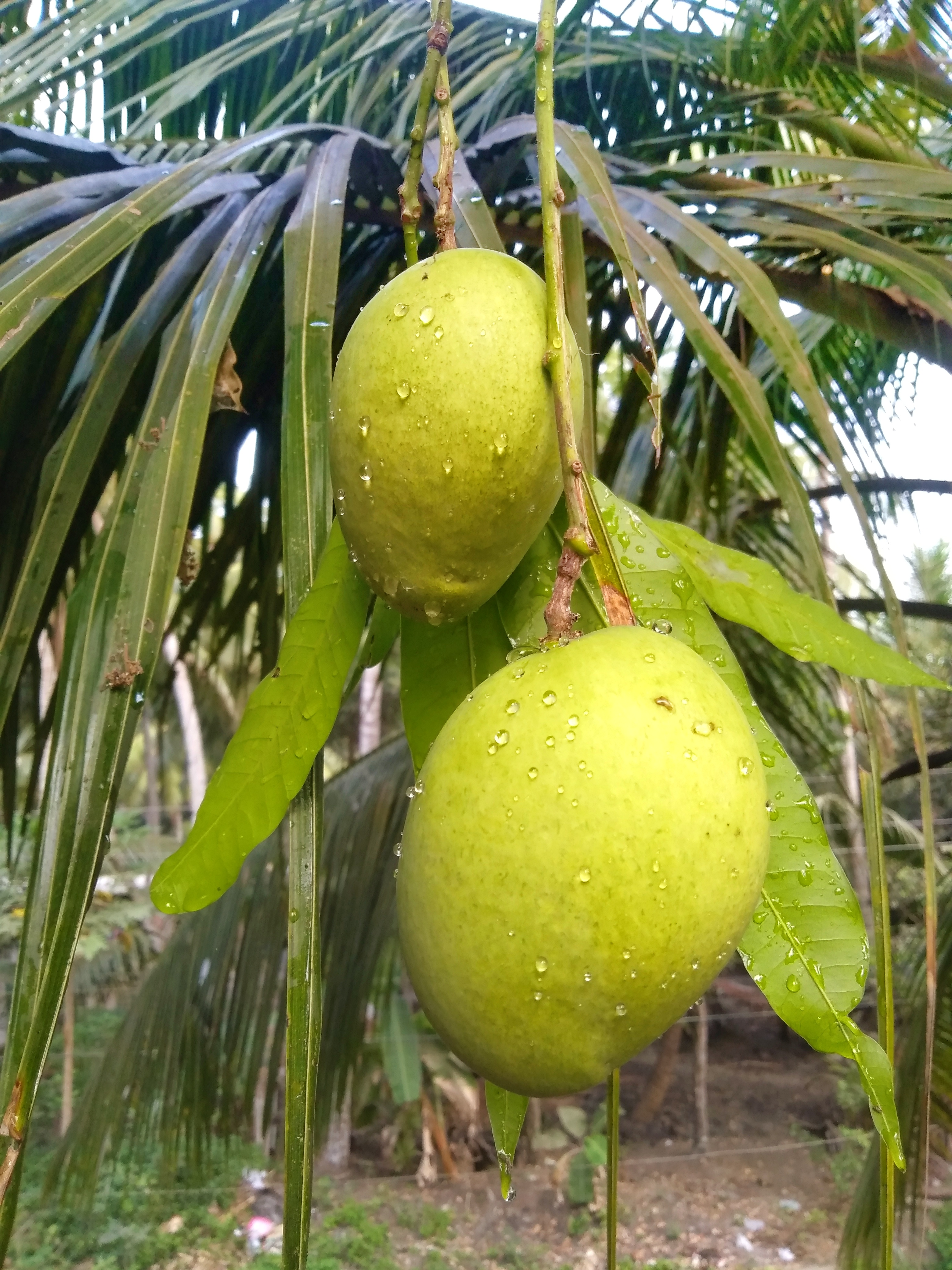 మామిడి కాయలు